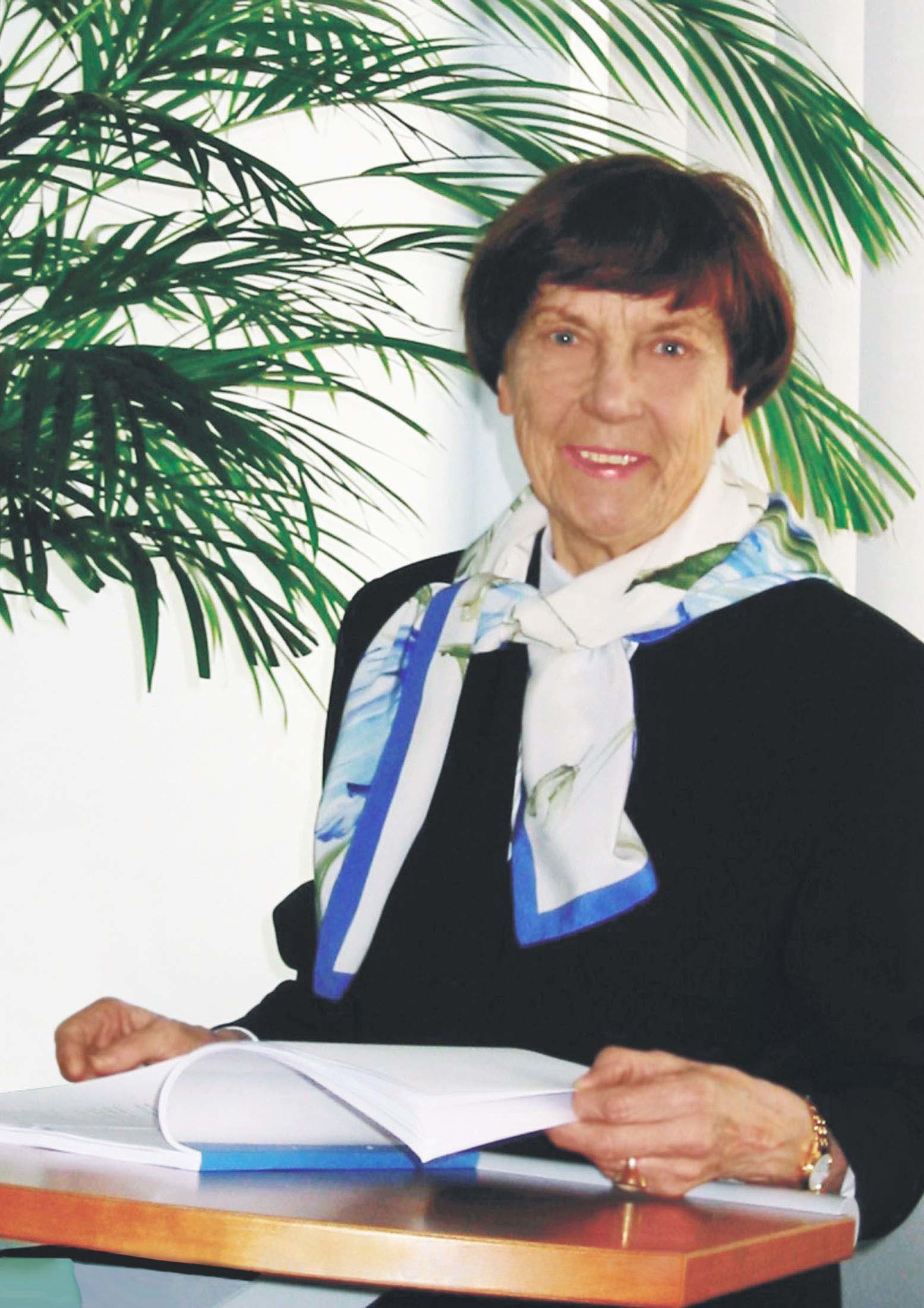 Portrait von Karoline Goldhofer-Prützel